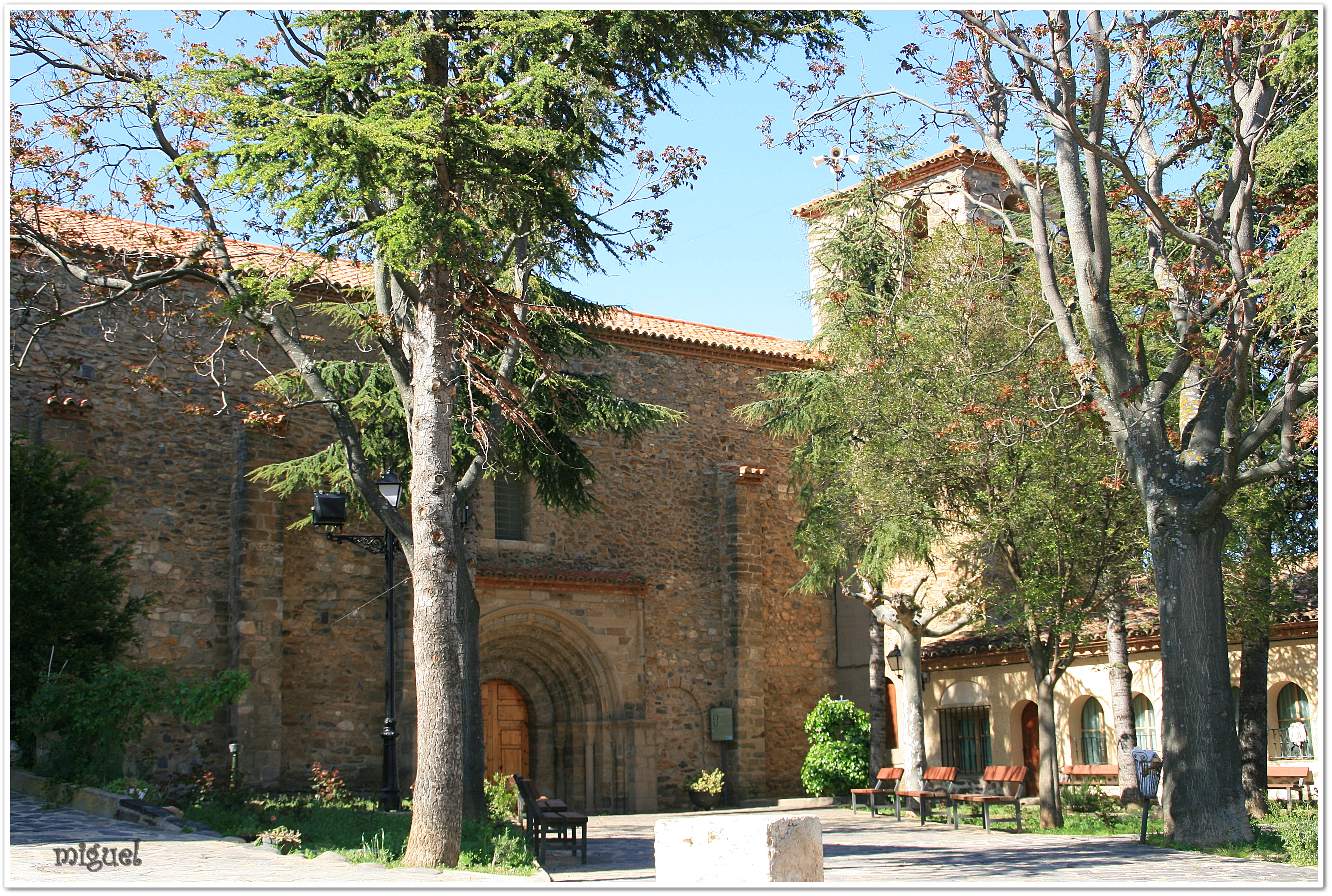 Añón de Moncayo: Iglesia de Santa María. De estilo gótico,aunque aun conserva la portada románica del siglo III. Añón fue desde el siglo XII la primera fuerza aragonesa frente a Castilla en la vía del Huecha. Durante la Edad Media perteneció a la Orden de San Juan. La obra actual correspondería al siglo XIV, después del abandono de la guerra de los dos Pedros. El castillo de Añón es uno de los mejor conservados de la comarca, ya que mantiene su planta rectangular original. Es un gran edificio distribuido en torno a un patio, y tiene cinco torreones cuadrados.